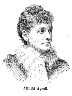 Alfhild Agrell i Nya Stockholm